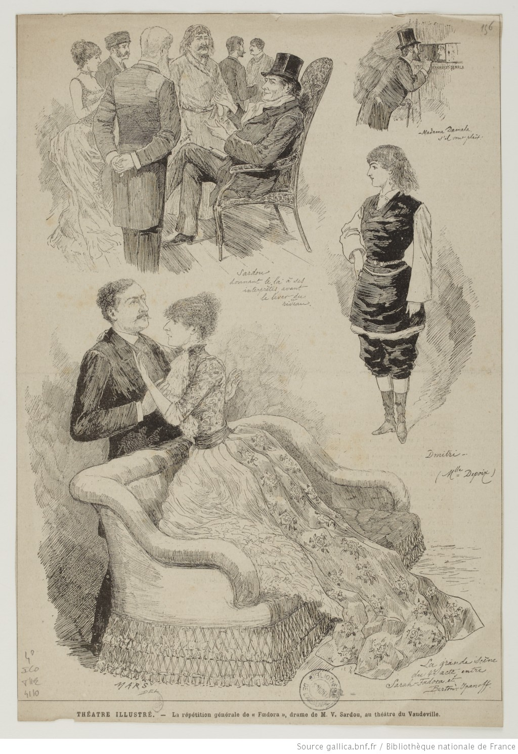 Fédora, drame de Victorien Sardou, Théâtre du Vaudeville, répétition générale, 11 décembre 1882 (Théâtre illustré, lithographie de Mars)